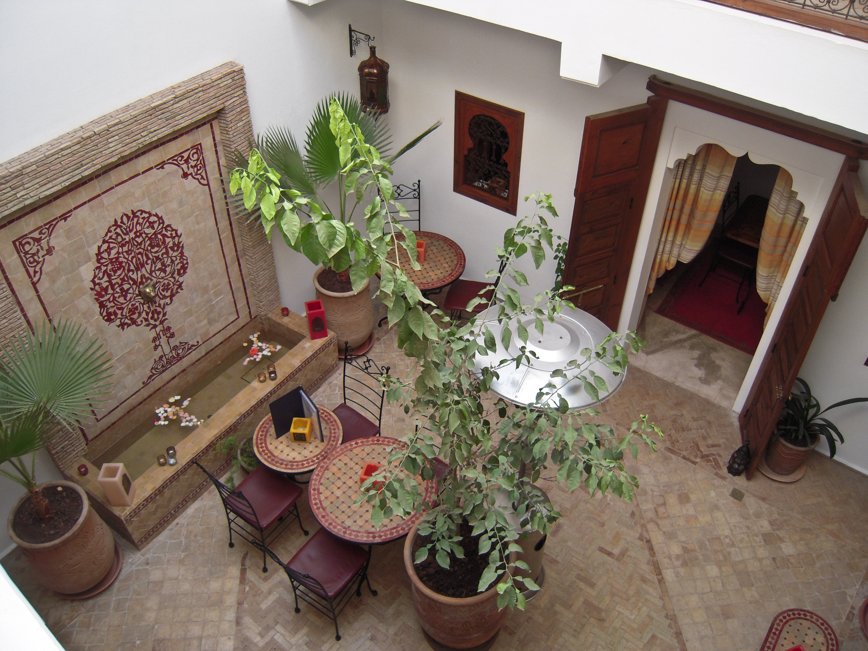 Marrakesh Riad